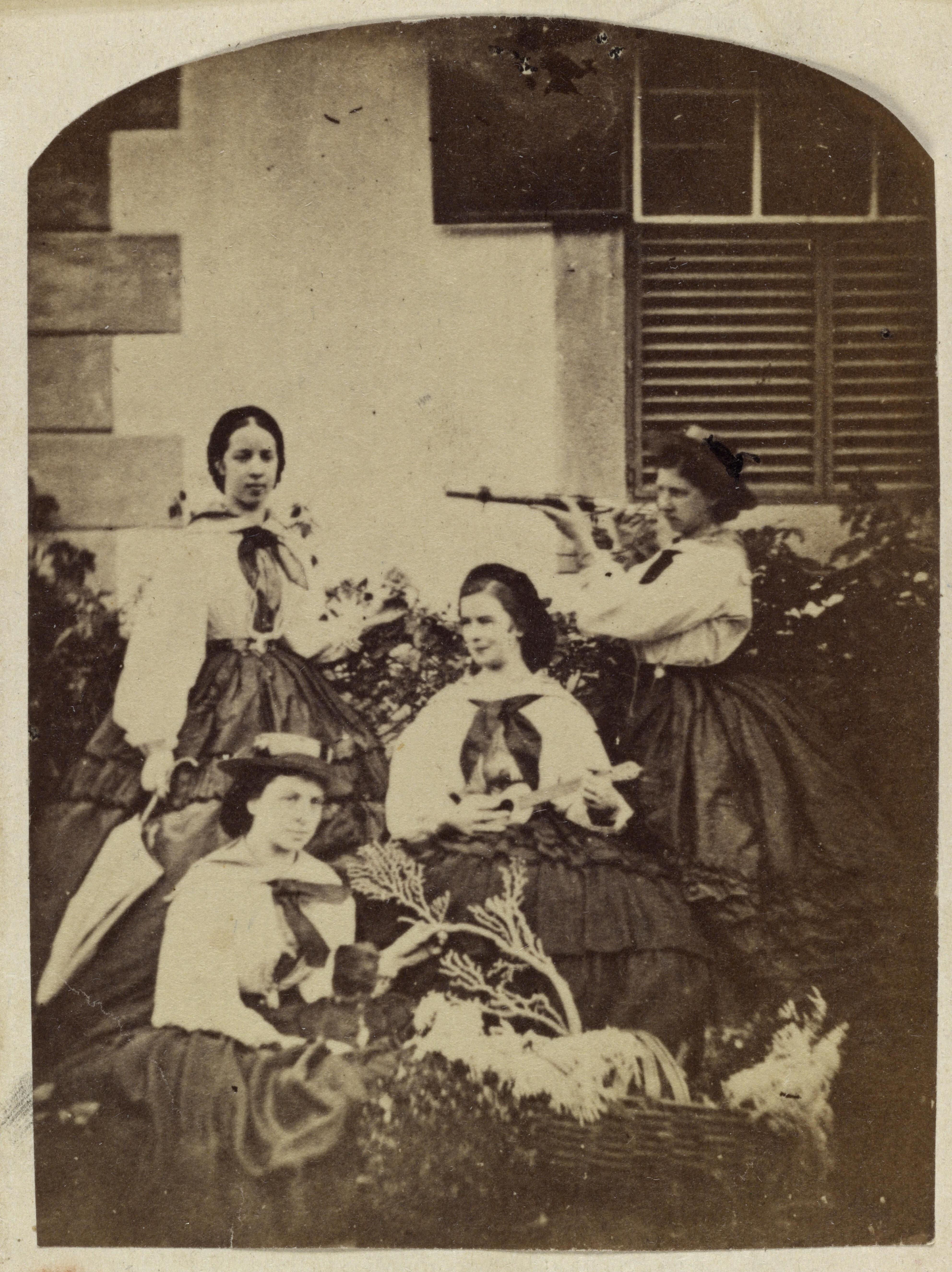 Kaiserin Elisabeth (mit Mandoline), Helene von Thurn und Taxis (mit Hund), dahinter Lily von Hunyady, Mathilde Windischgrätz (rechts mit Tubus) Foto ca. 1860 auf Madeira